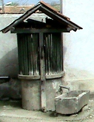 Fântână tradiţională din Racoviţa, Sibiu